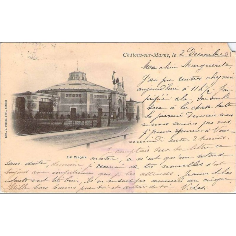 Carte postale. Le cirque, Châlons-sur-Marne. Texte: (...) Jeanne et les enfants vont très bien; ils ne se sont pas amusés au cirque (...)